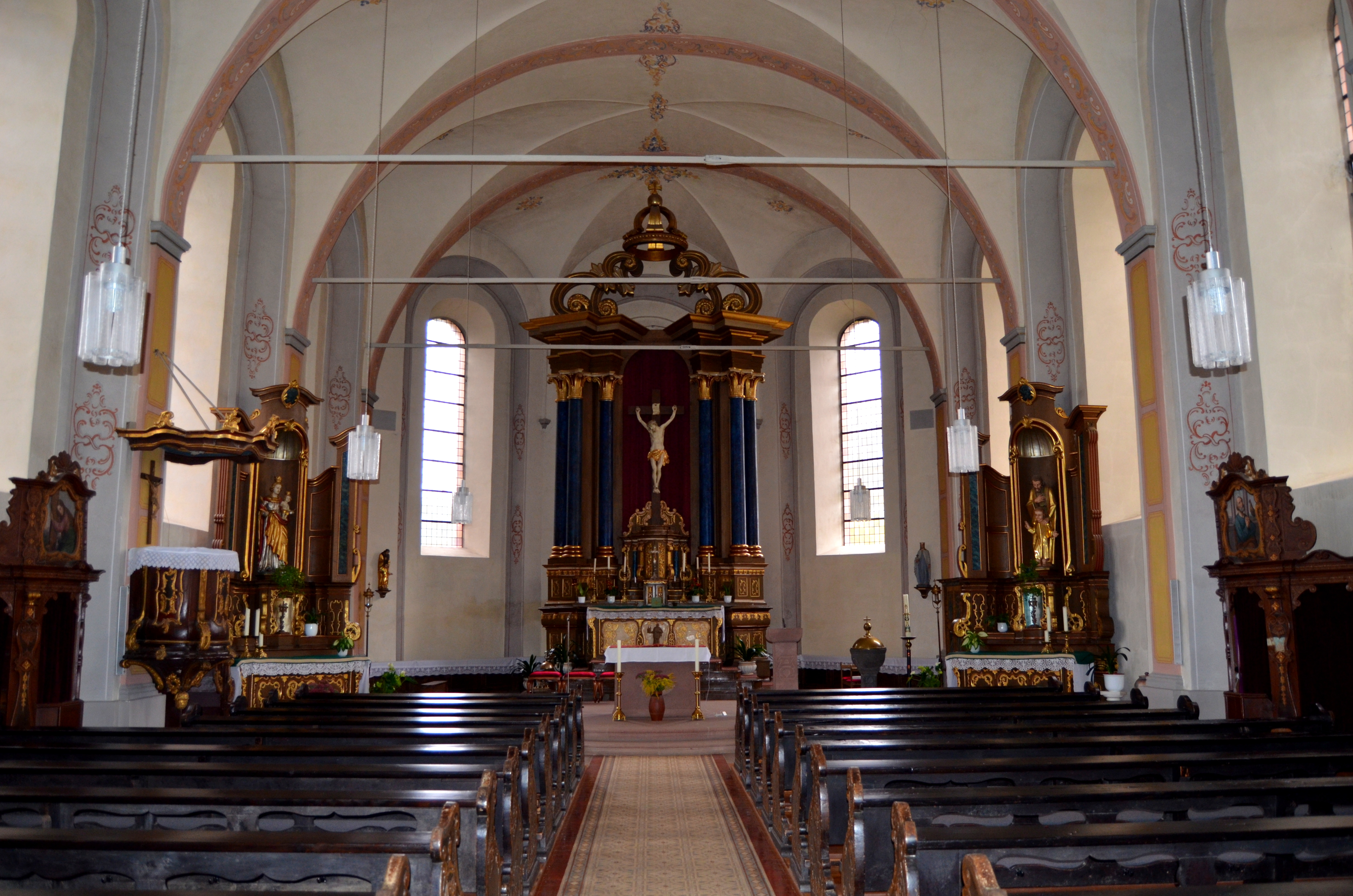 St. Castor, Mörsdorf (Hunsrück), interieur